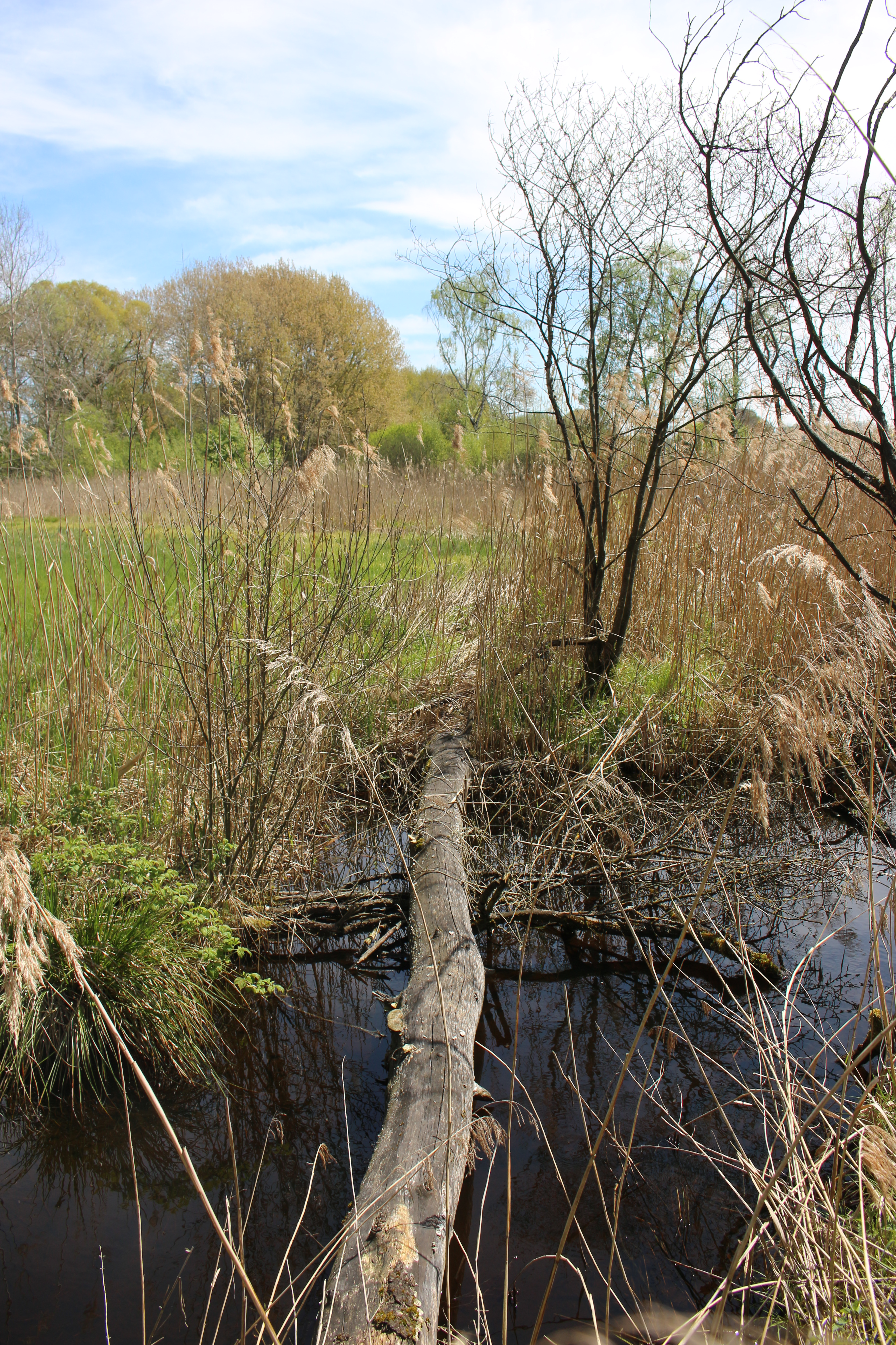 Weichser Niedermoor im Glonntal bei Jedenhofen im Naturschutzgebiet „Weichser Moos“